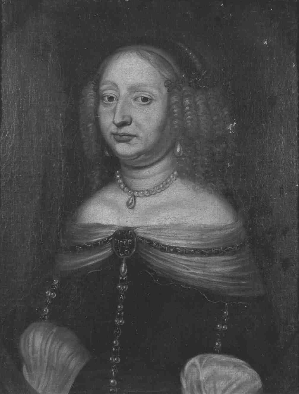 Sophie Eleonore von Sachsen (1609-1671), Landgräfin von Hessen-Darmstadt, Gemahlin des Landgrafen Georg II.